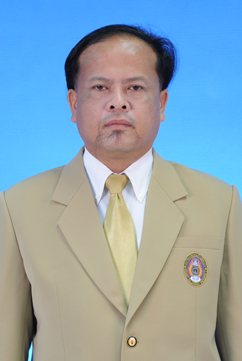 ประกาศิต อานุภาพแสนยากร อธิการบดีมหาวิทยาลัยราชภัฎศรีสะเกษ